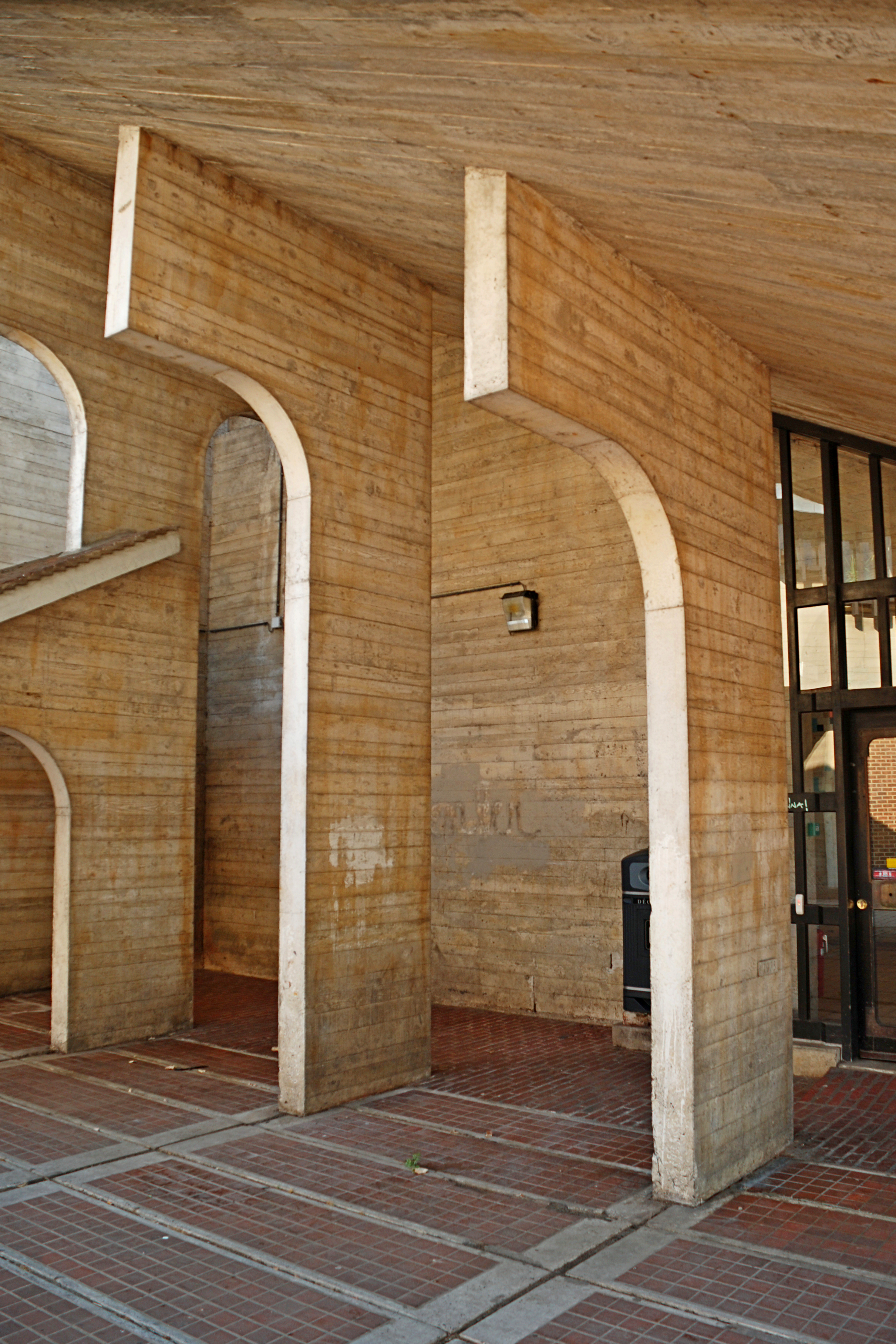 Belgique - Louvain-la-Neuve - Place des Sciences - ancienne poste (architecture brutaliste 1973) This photo of immovable heritage has been taken in the Walloon Region